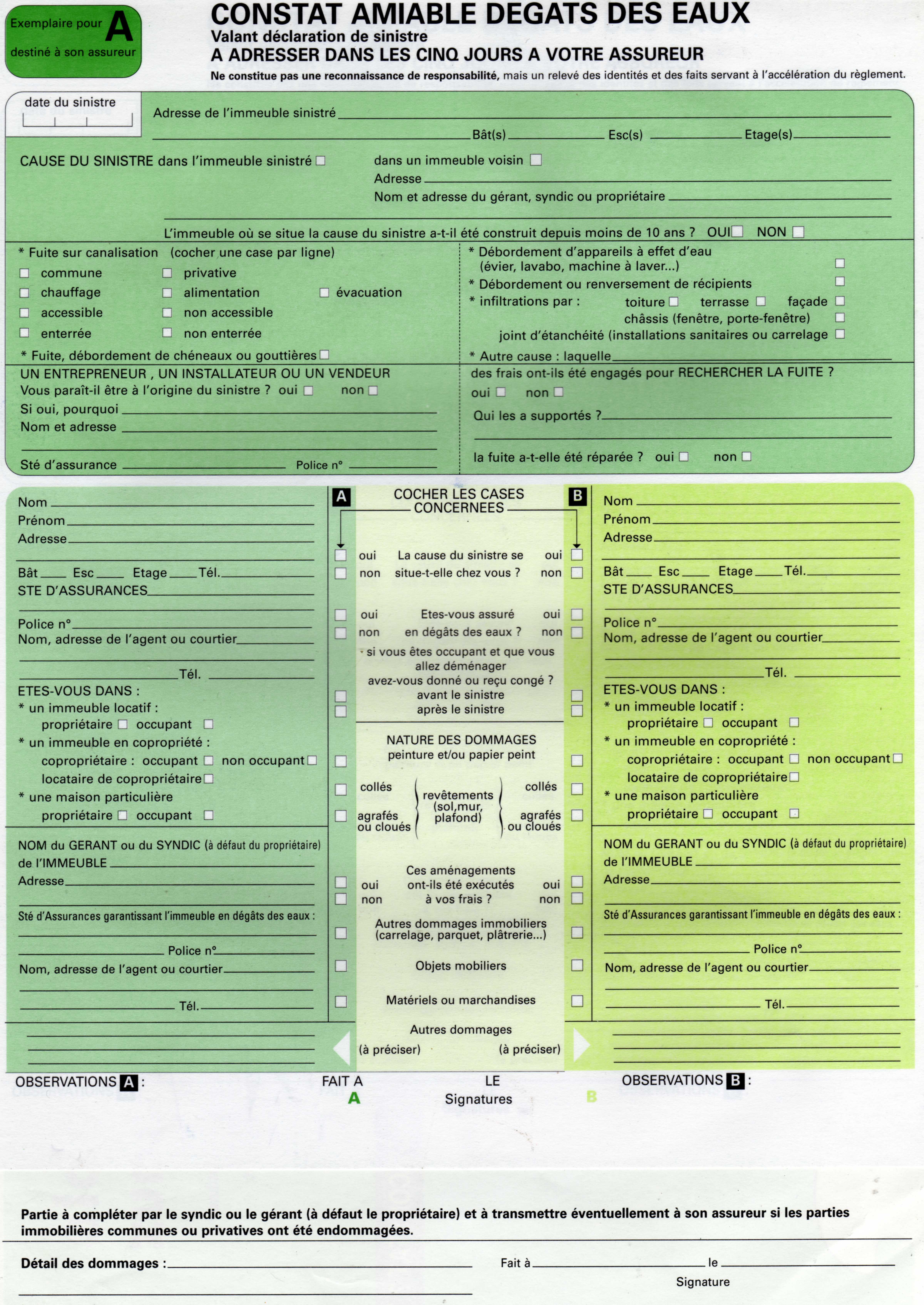 constat amiable de degats des eaux français